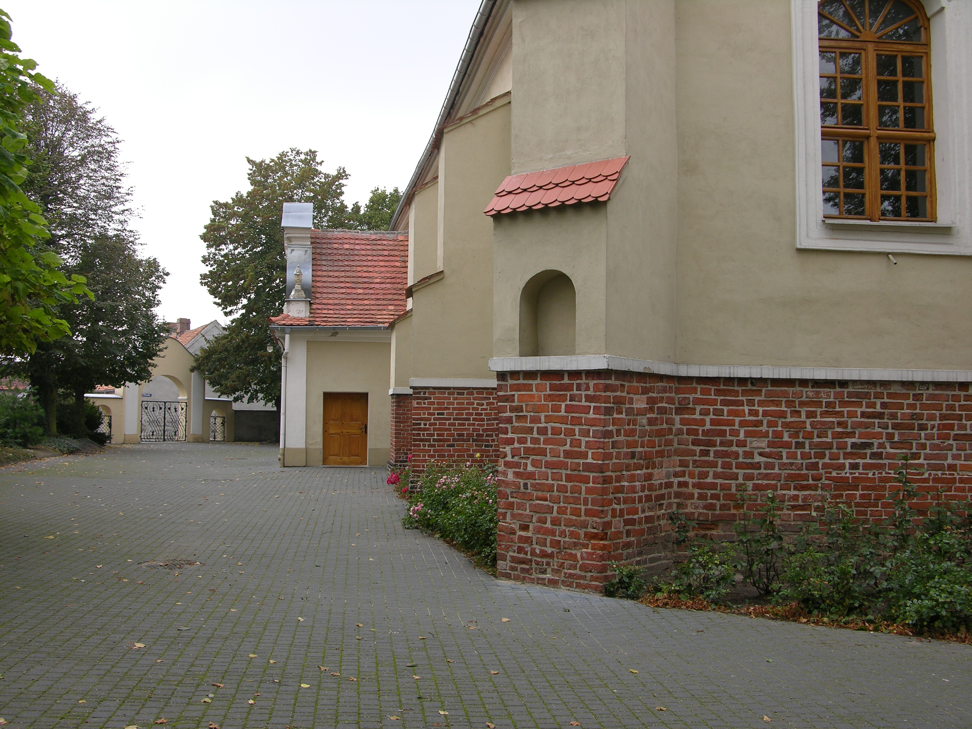 Kościół w Ostrorogu - kruchta od strony płd